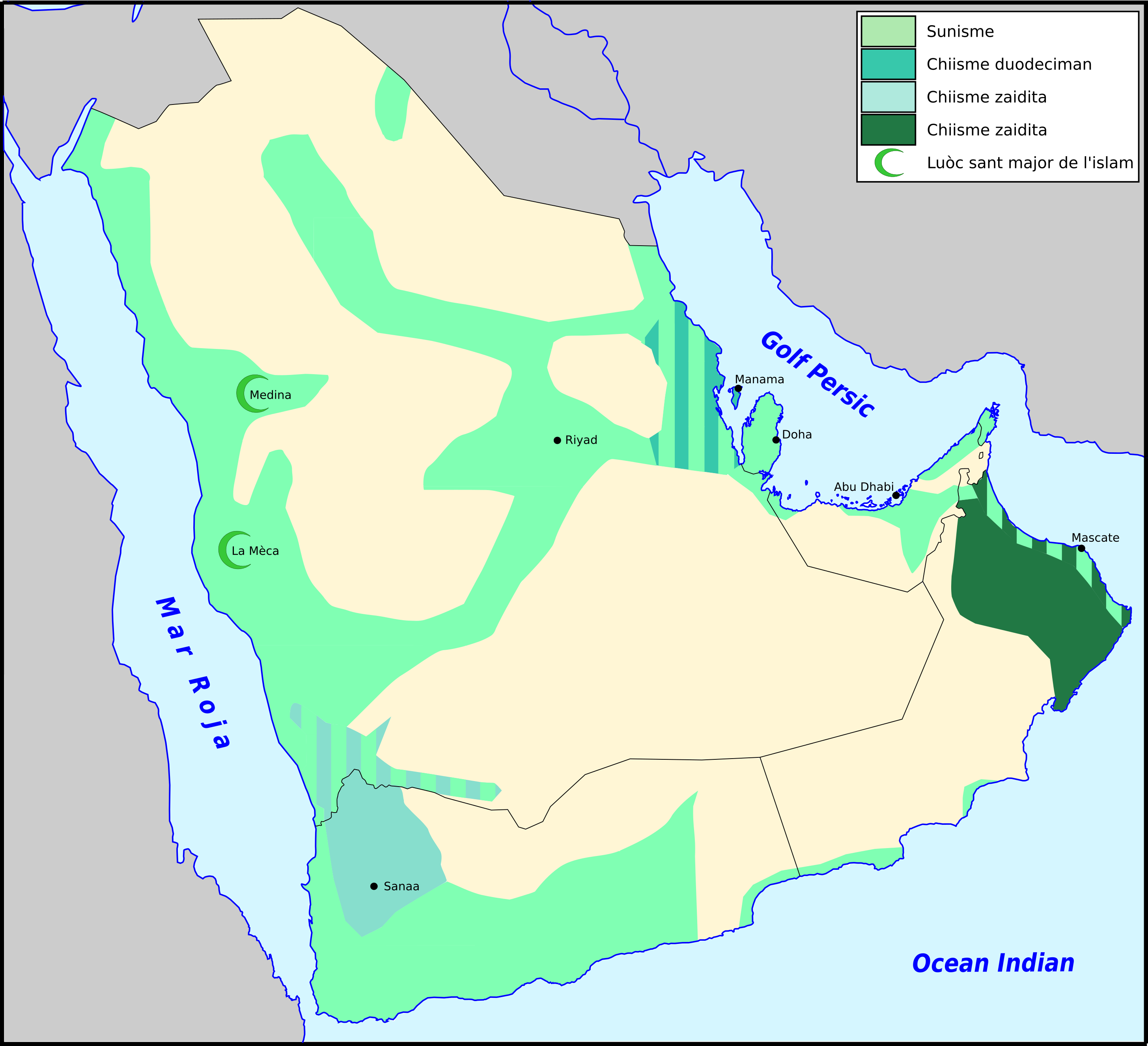 Esquèma simplificat dei religions dins la Peninsula Aràbia.